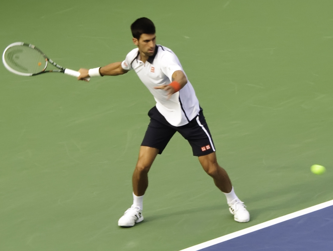 Novak Đoković à l'US Open en 2012.